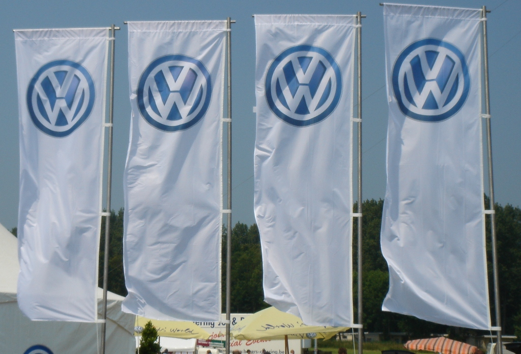 Vlaggen met Volkswagen logo's